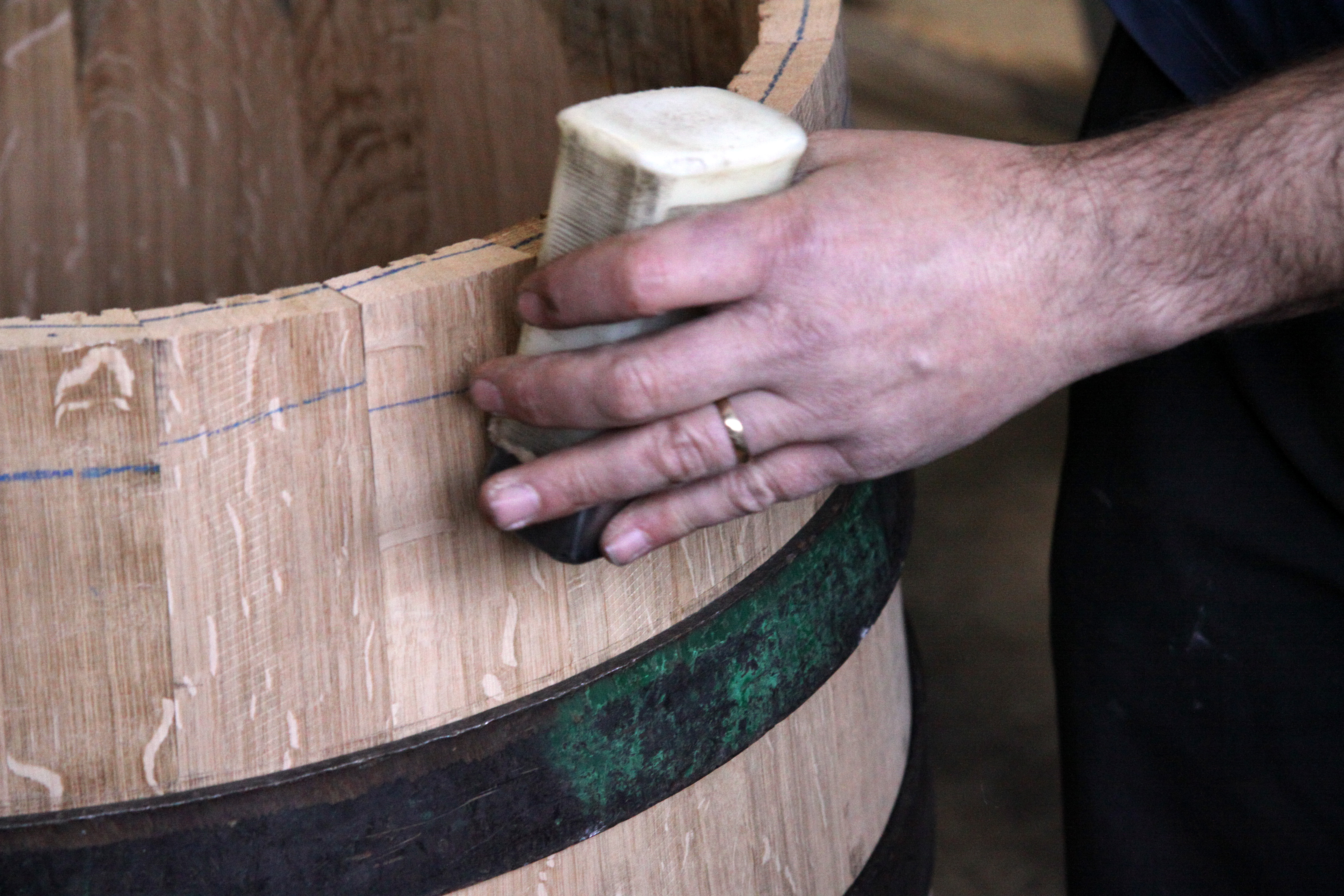 Cerclage des douelles d'un tonneau pour le maintien pendant la chauffe